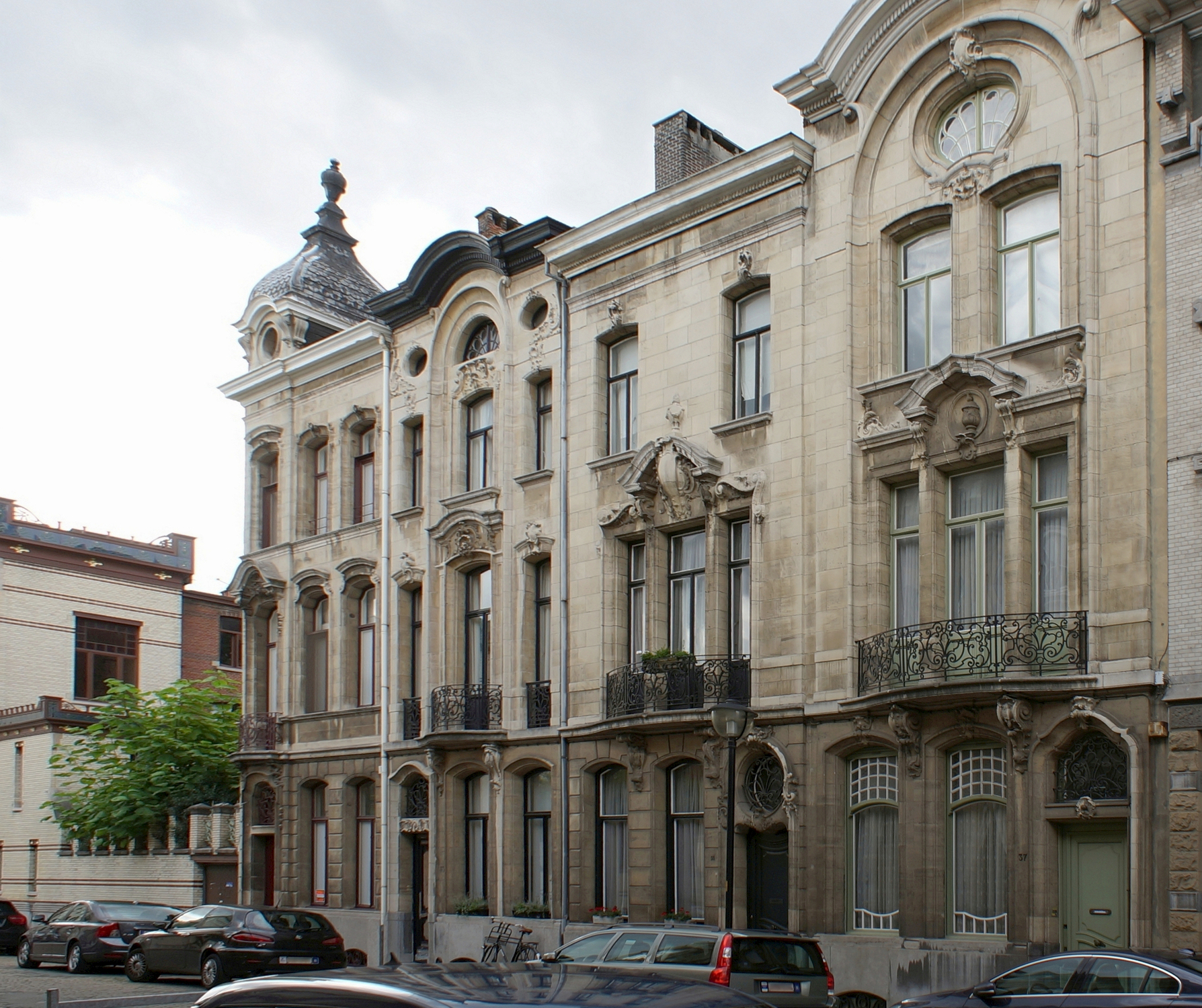 Berchem (Antwerpen), Generaal Van Merlenstraat 31 tot 37 - Burgershuizen in neorococostijl, ontworpen door architect Ernest Dieltiens.